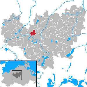 Lüssow in Mecklenburg-Vorpommern - District Güstrow